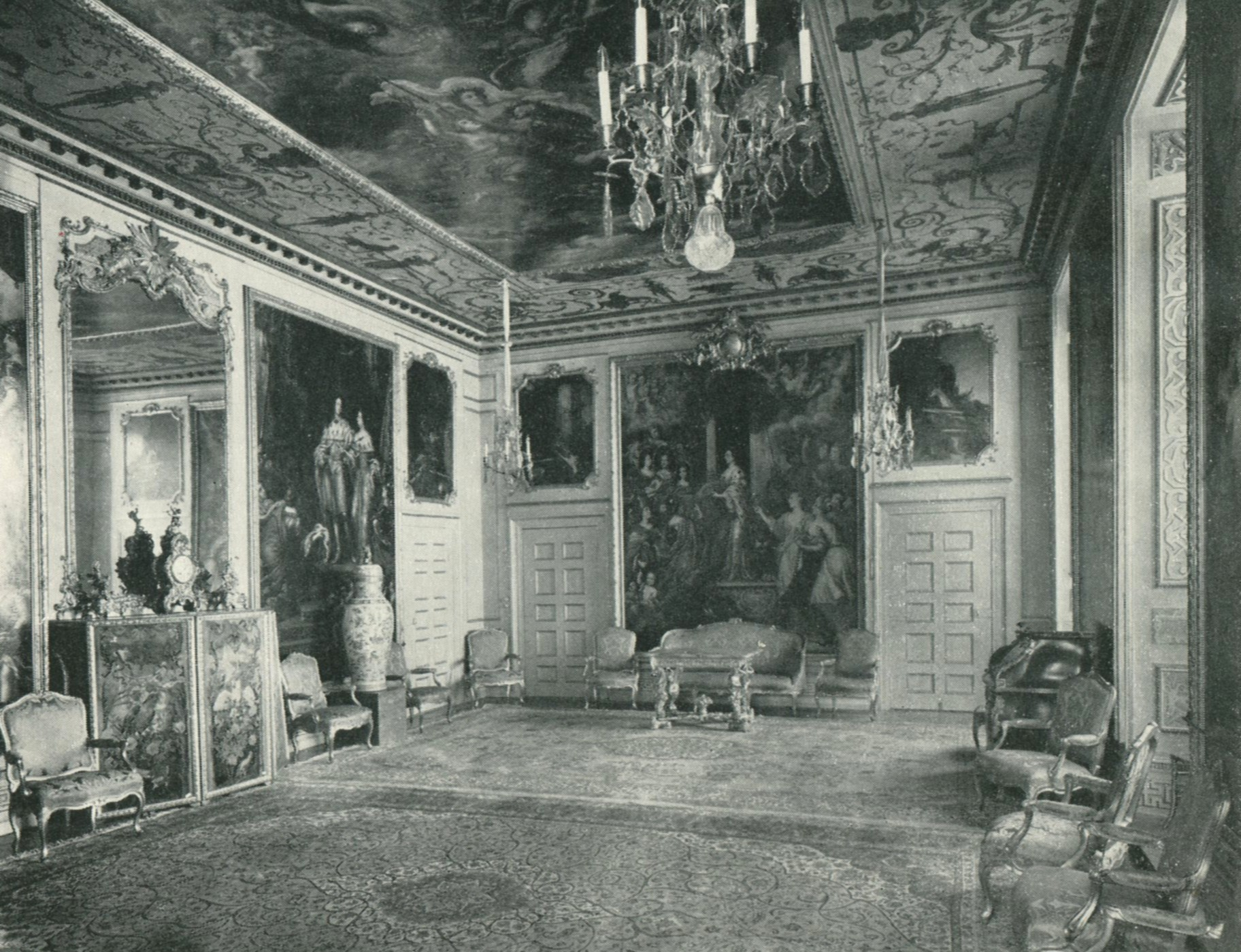 Ehrenstrahlsalongen